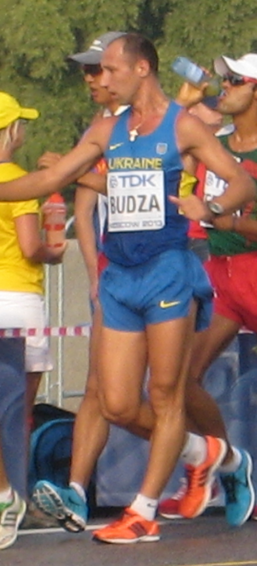 Чемпионат мира по лёгкой атлетике 2013. Ходьба 50 км, мужчины. Пелотон